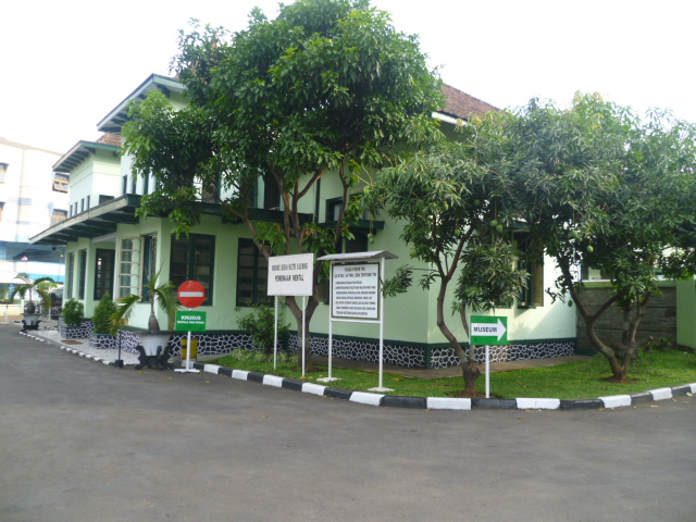 Museum Mandala Wangsit Siliwangi